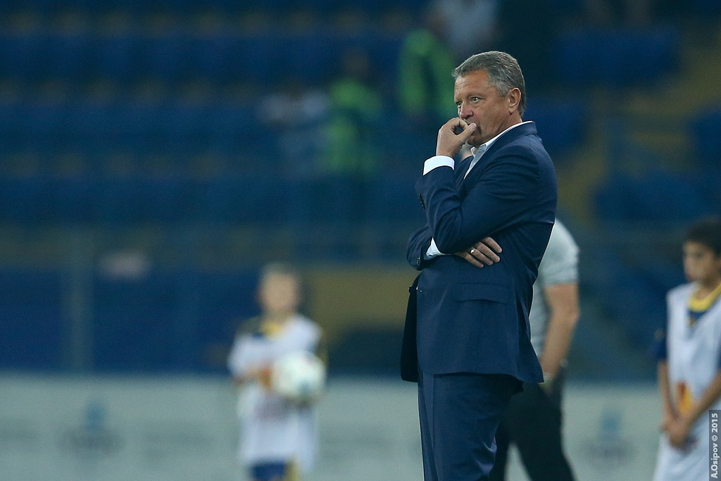 27.09.2015 г.Харьков. Стадион "Металлист". 9-й тур Лиги Пари-Матч Металлист - Днепр - 1:2